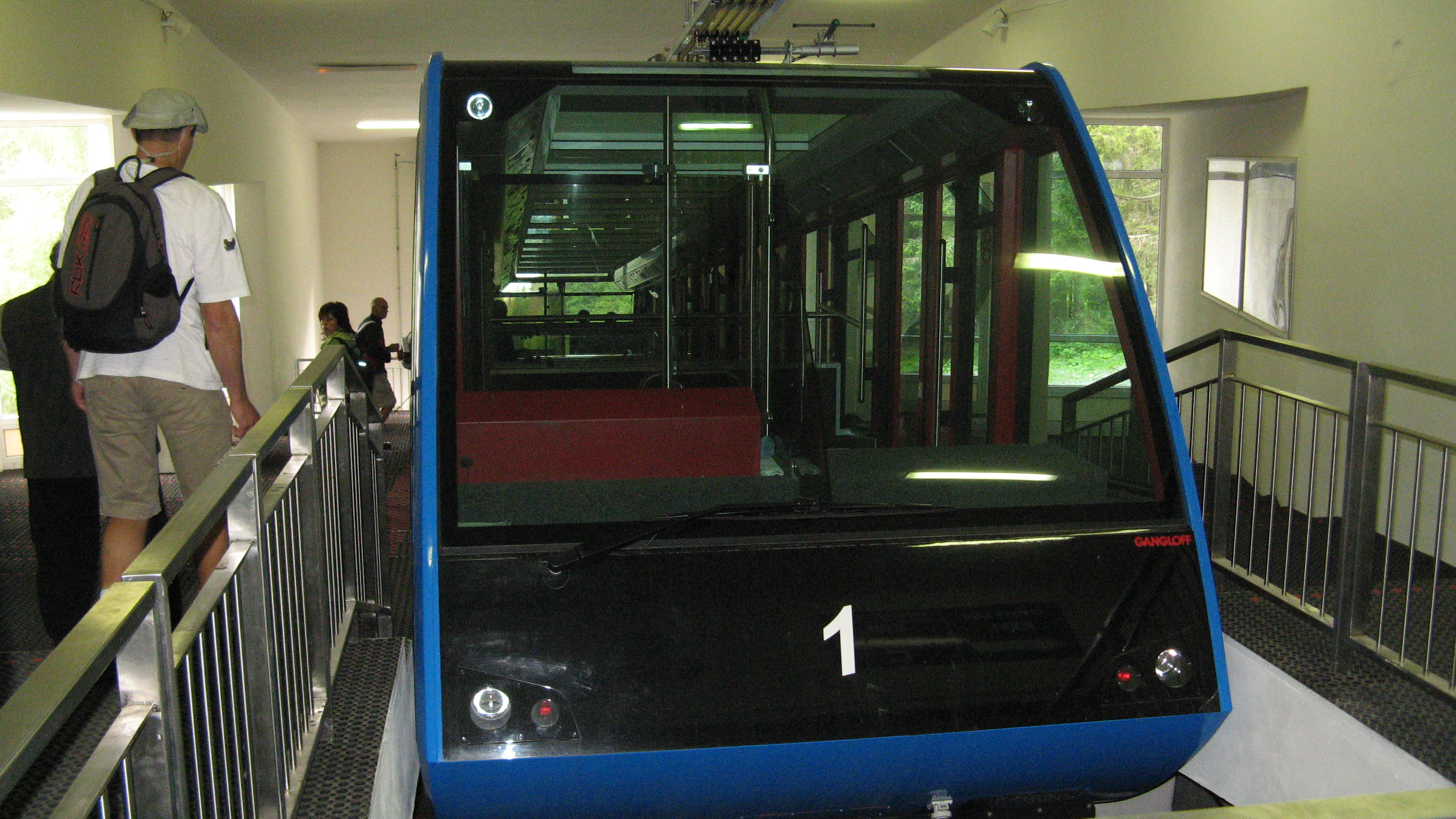 Standseilbahn von Stary Smokovec auf den Hrebienok